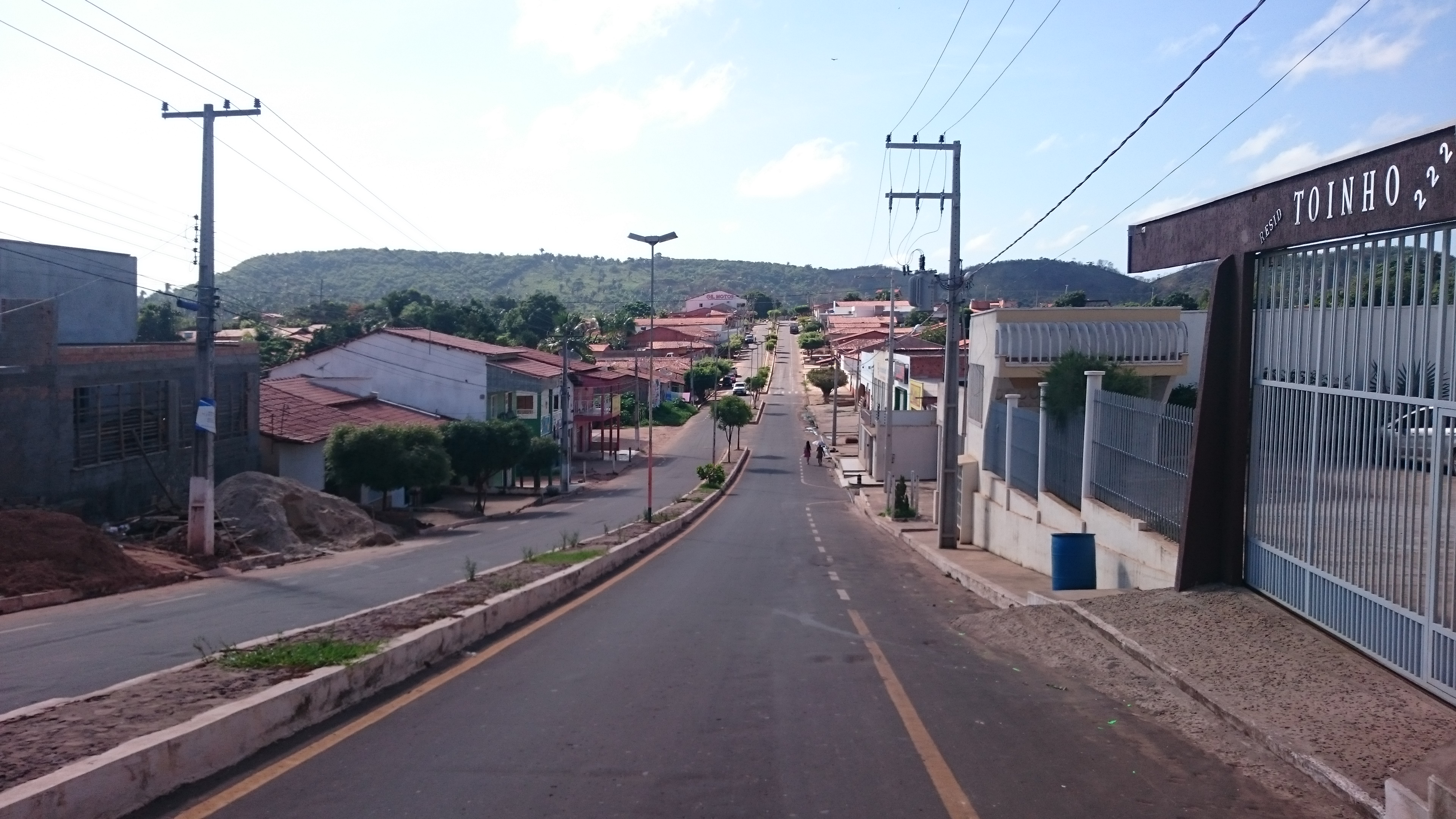 Av. José Vieira de Melo, Bairro Rodoviário, Lago da Pedra - MA